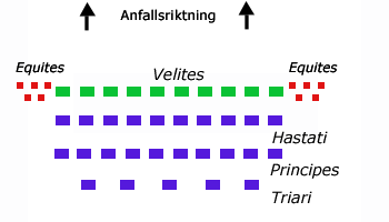 Skiss över romersk legion uppställd i mainplar